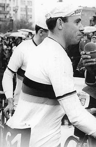 Zentralbild/Kohls 4.5.1962 XV. Internationale Friedensfahrt 1962. 2. Etappe Berlin-Leipzig (3.5.62). UBz: Kurz vor dem Start in der Berliner Karl-Marx-Allee. Rundfunkreporter Heinz-Florian Oertel wechselt einige Worte mit dem DDR-Fahrer Klaus Ampler. Information added by Wikimedia users.Ausschnitt: Klaus Ampler